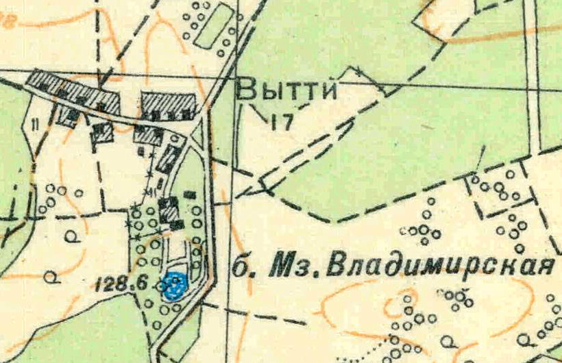 Топографическая карта Ленинградской области, квадрат О-35-24-Б-в (Вохоново), деревня Вытти